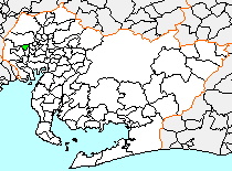 Miwa, Aichi